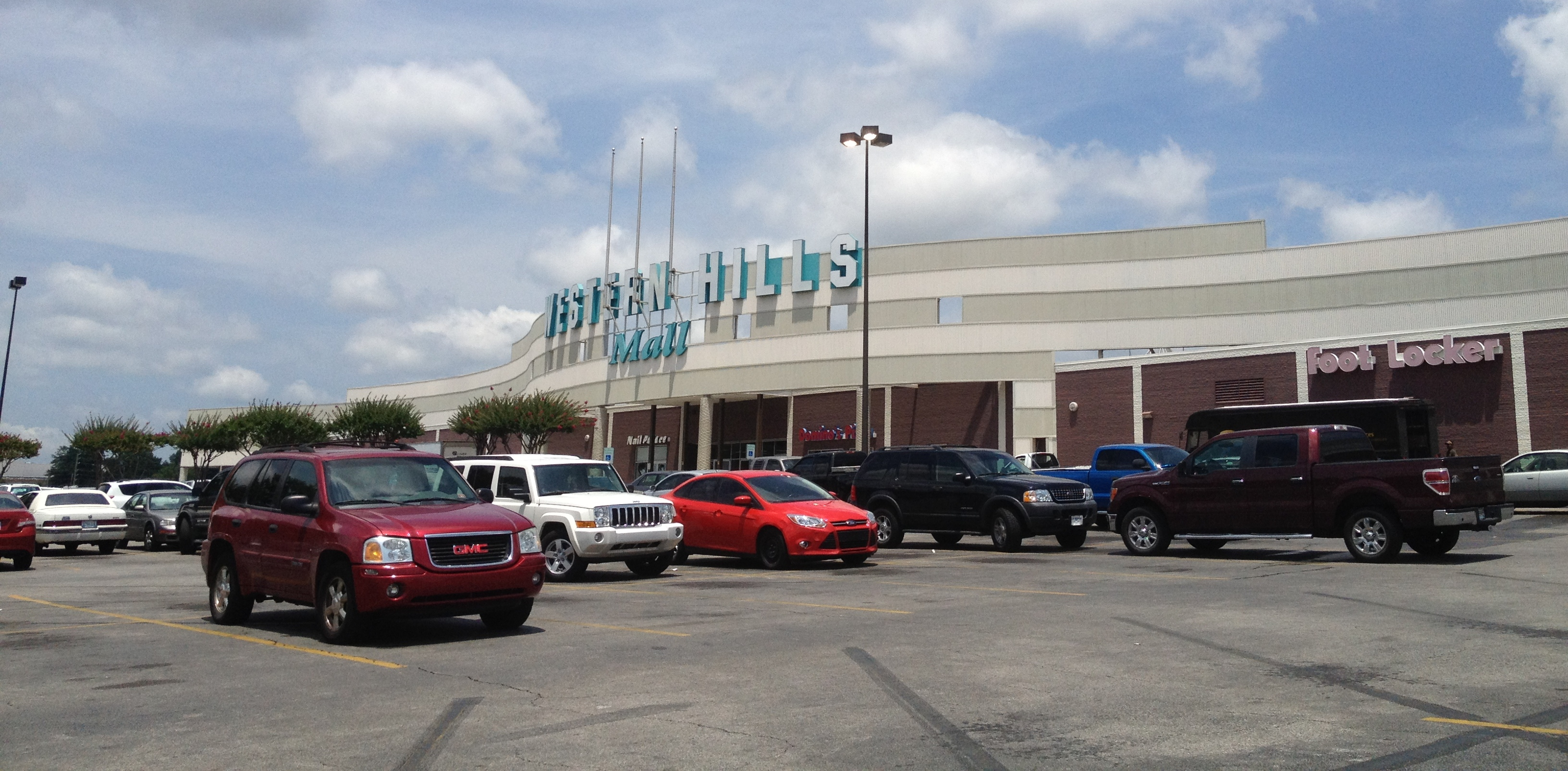 Western Hills Mall